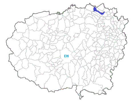 posizione del comune in provincia di Cuneo